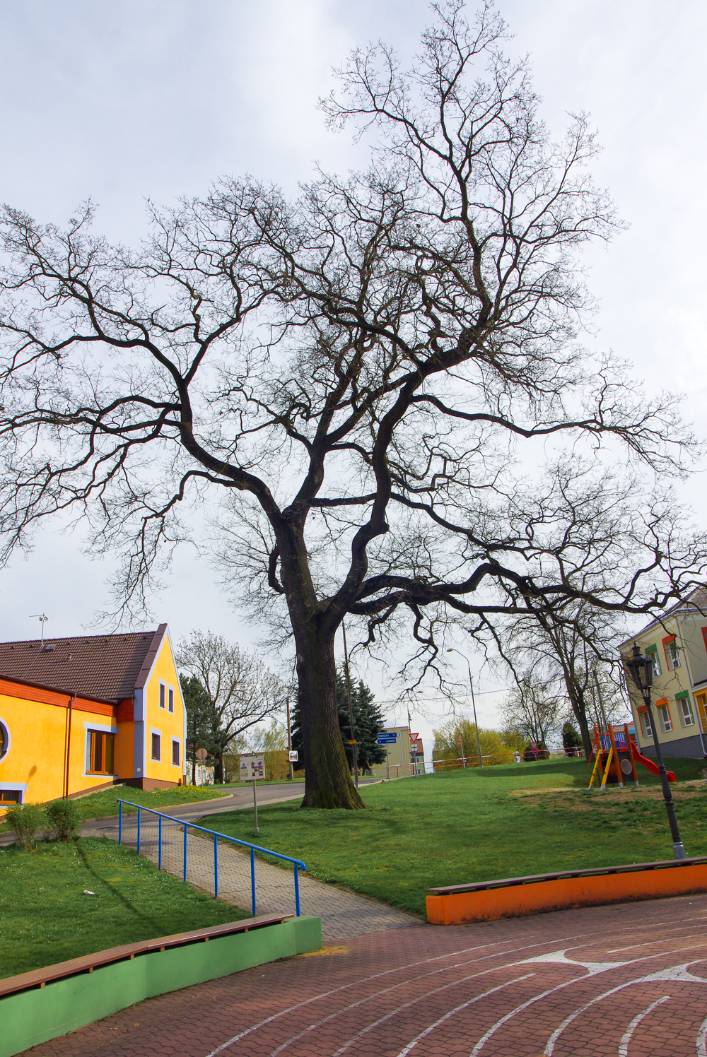 Vintířov, památný dub, okres Sokolov